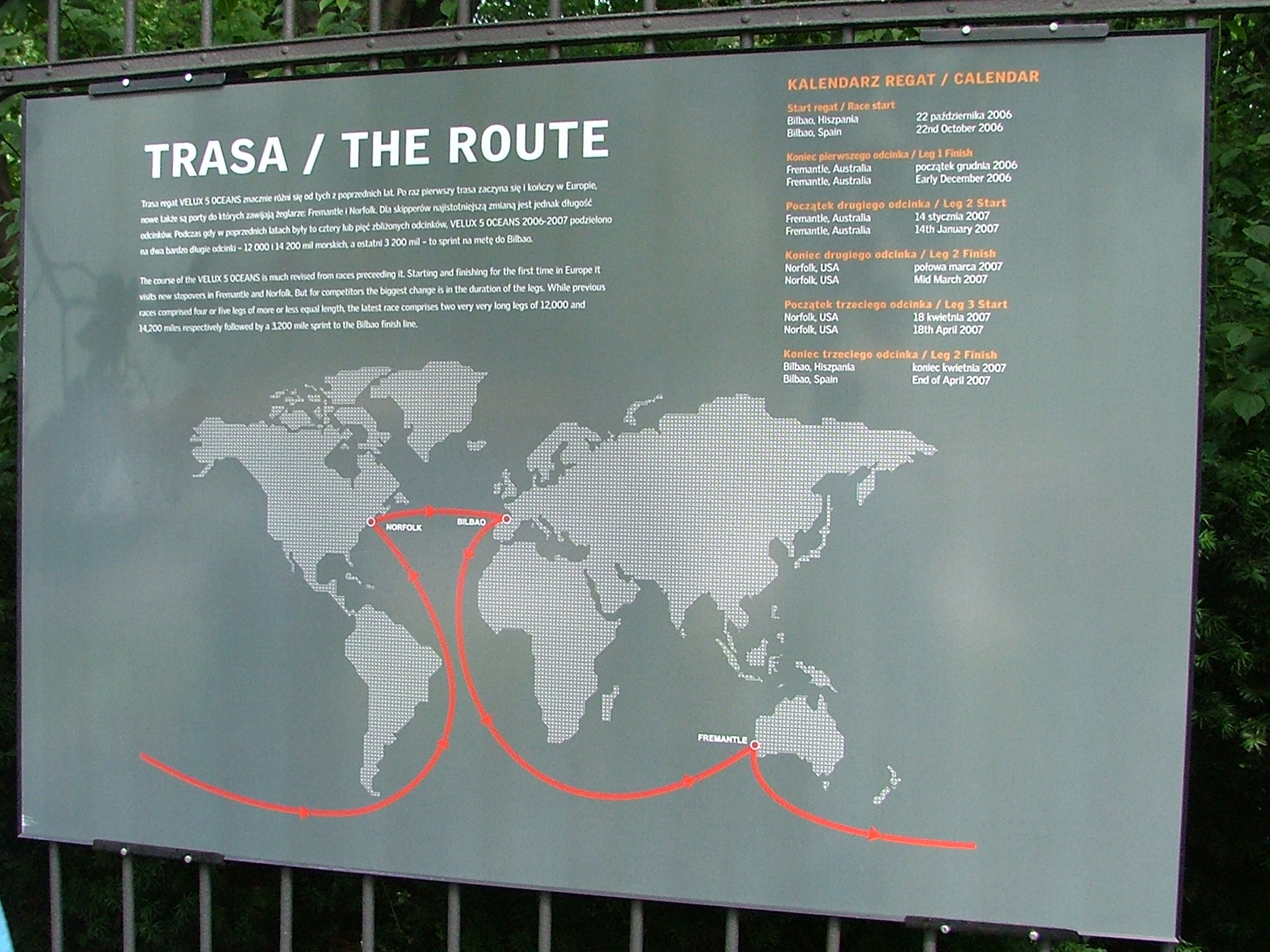 Pl, Warsaw, Poland, Ogrodzenie Łazienek Królewskich w Warszawie: wystawa fotograficzna „VELUX 5 Oceans 2006 - 2007”